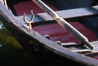 Åregaffel på sørlandssjekte